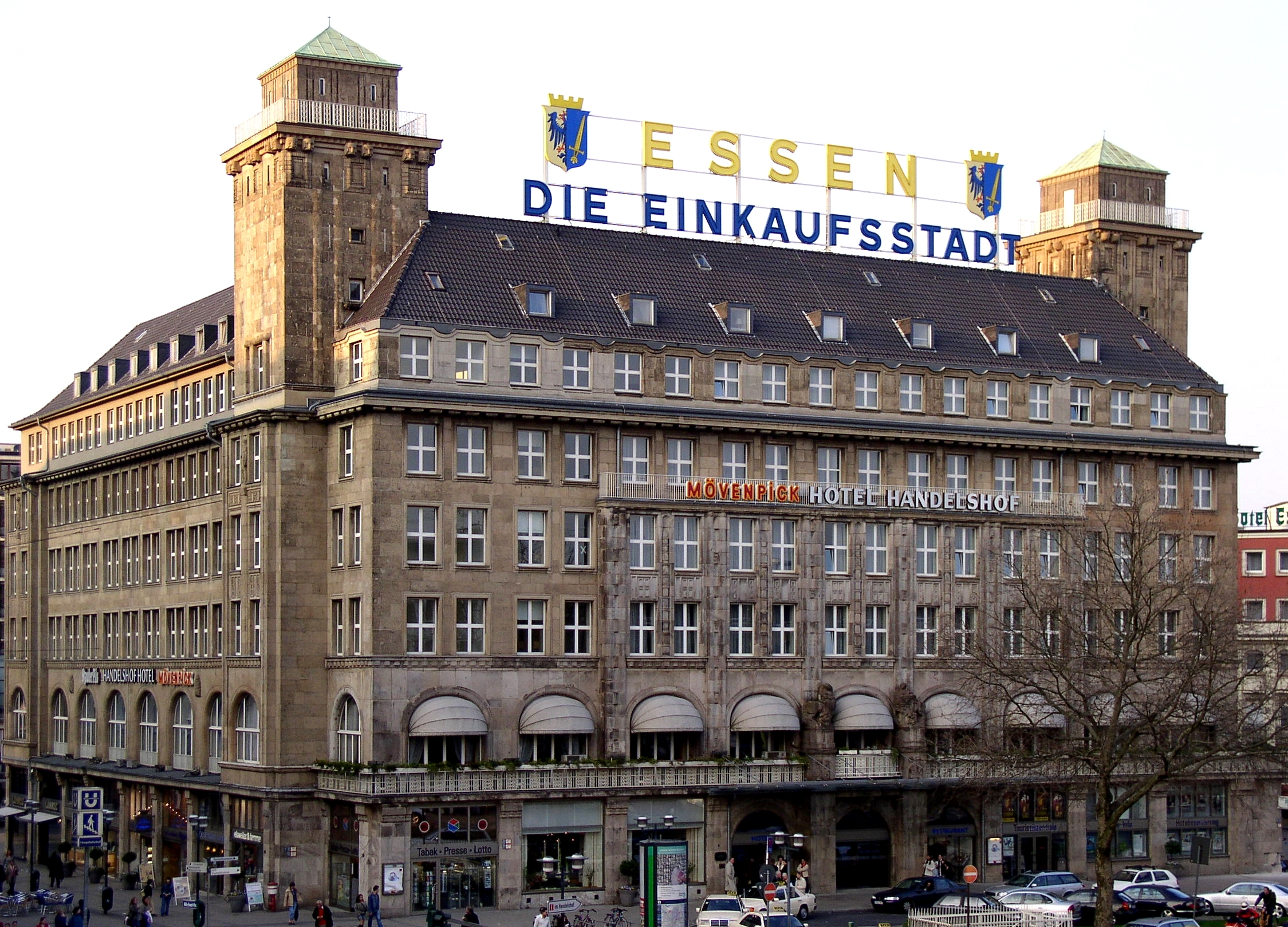 Hotel Handelshof in Essen This is a photograph of an architectural monument.